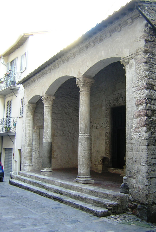 Esterno chiesa Santa Maria Impensole di Narni External view of Santa Maria Impensole church in Narni Italy photo by Antonio Sebastiani, 2006